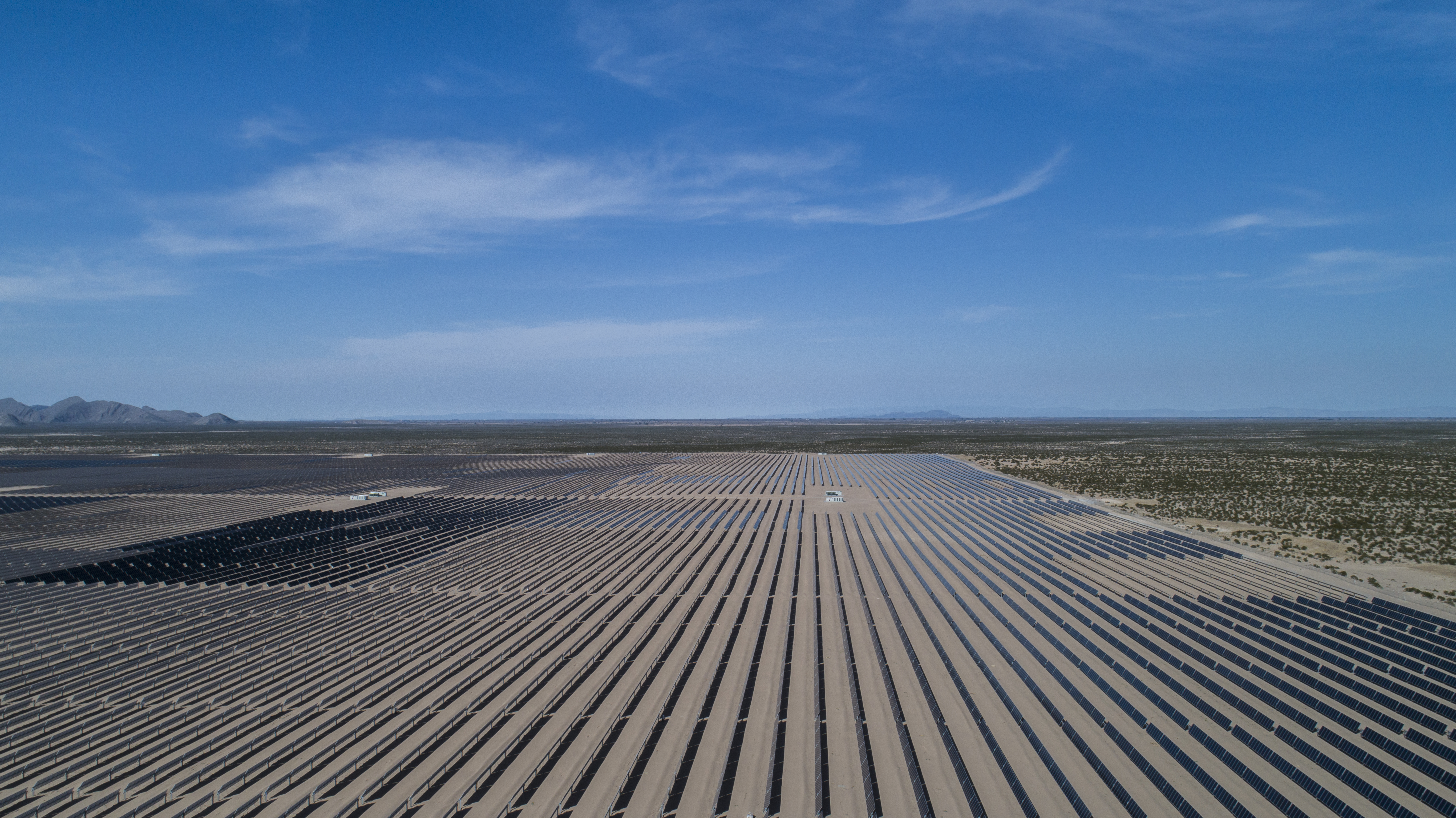 Planta Solar Villanueva, Coahuila